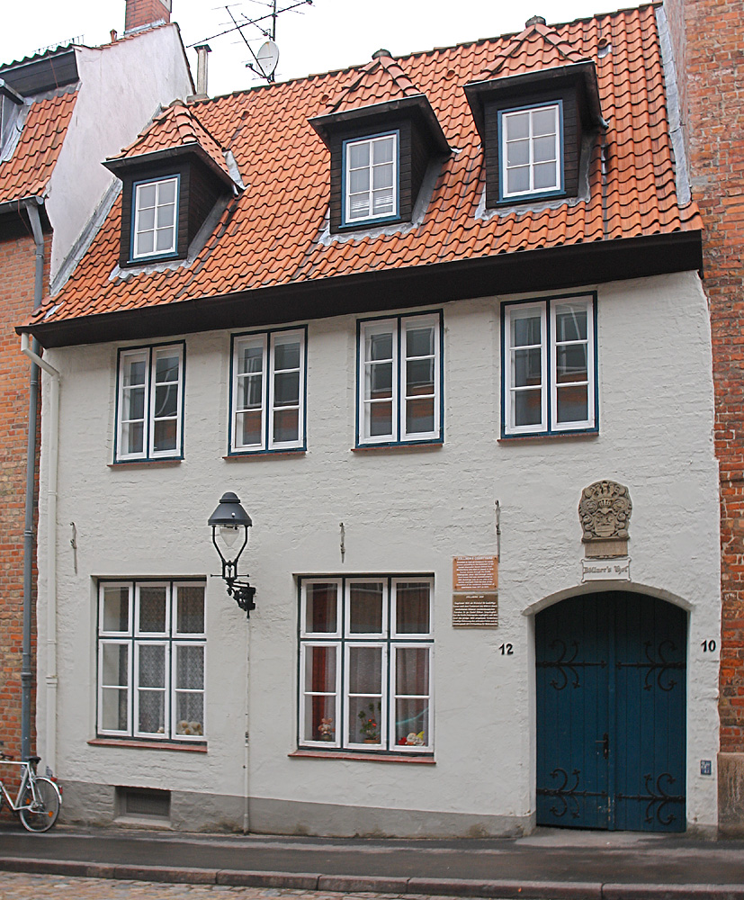 Zöllners Hof in Lübeck, Depenau 10. Gegründet 1622 als Wohnhof für bedürftige Frauen nach dem Testament des 1618 in Lübeck verstorbenen früheren mecklenburgischen Kanzlers Dr. jur. Daniel Zöllner. Seit 1825 durch dieses 1885 umgebaute Vorderhaus zugänglich.